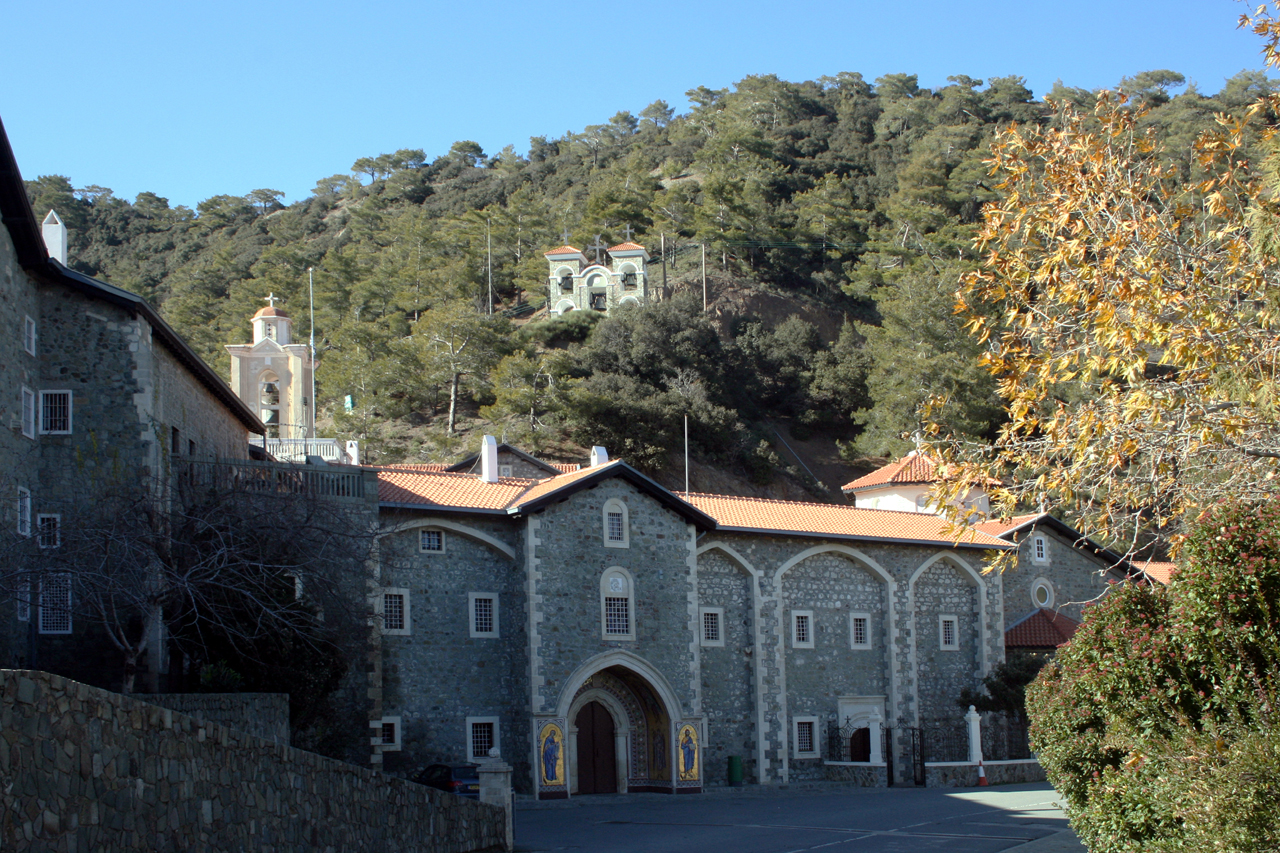 Monastere Kykkos